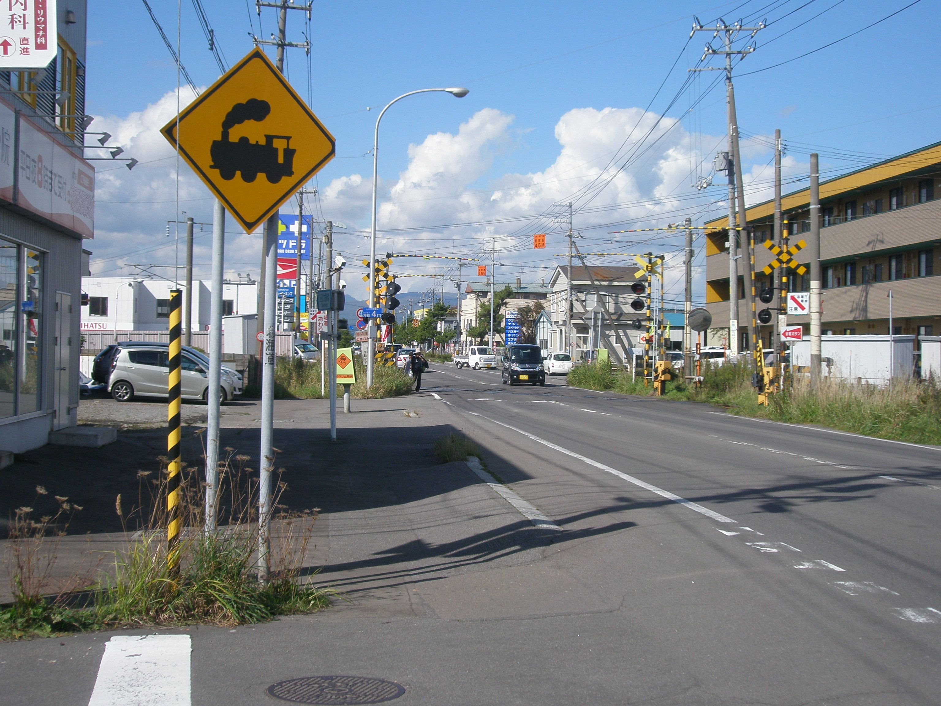 北海道道100号函館上磯線・道南いさりび鉄道線（旧・JR北海道江差線）七重浜道路踏切